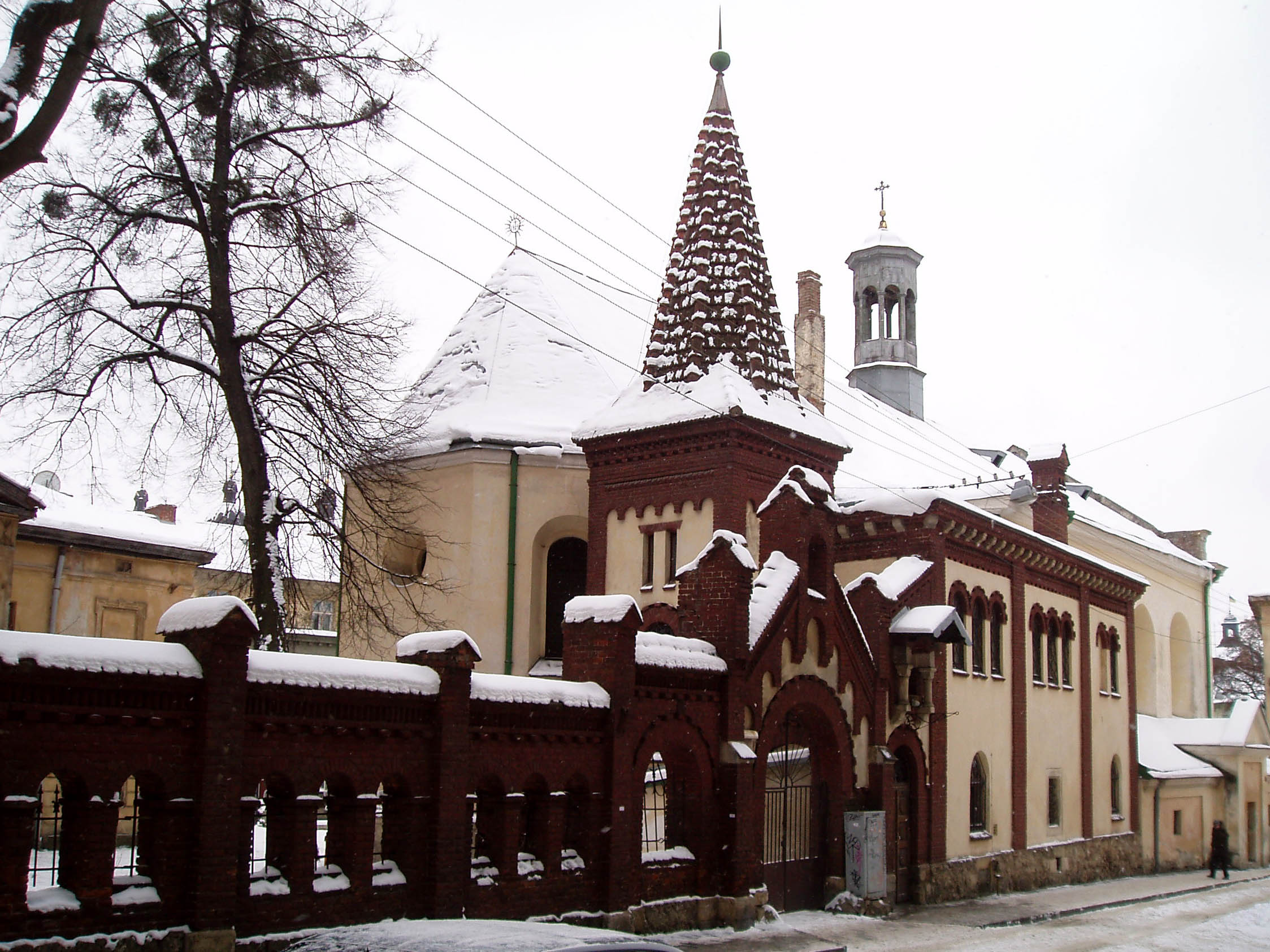 Неороманські прибудови Юліана Захаревича при колишньому костелі Марії Сніжної.